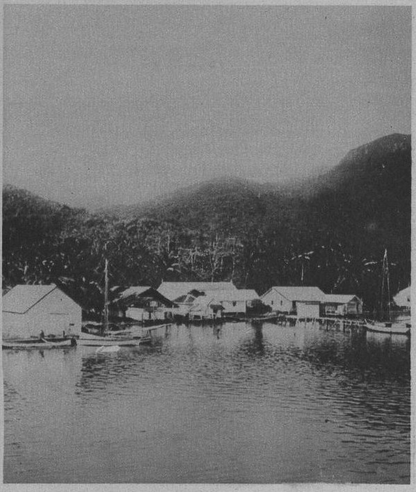 C'est une vue générale d'Apia aux îles Samoa du début du XIXe siècle.